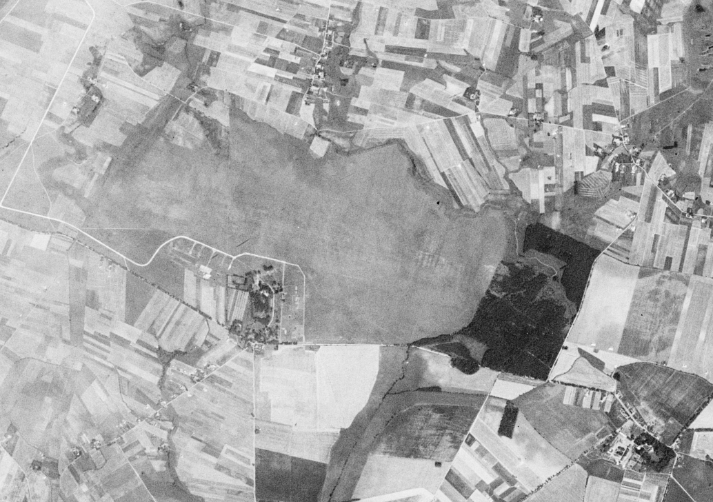 Lotnisko Bednary sfotografowane przez amerykańskiego satelitę wywiadowczego Corona 98 (KH-4A 1023) w dniu 23 sierpnia 1965 r. Widoczne także Łagiewniki i Krześlice.